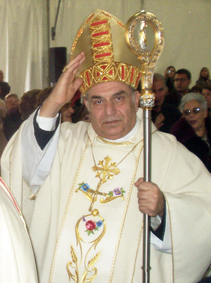 S.E. Mons. Paolo Romeo, Arcivescovo di Palermo